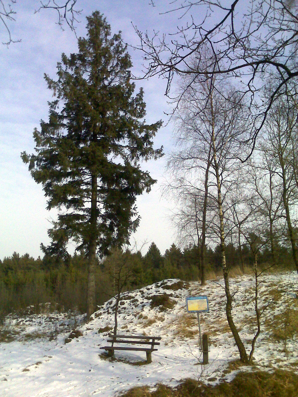 Einer der Dithmarscher Berge bei Aukrug